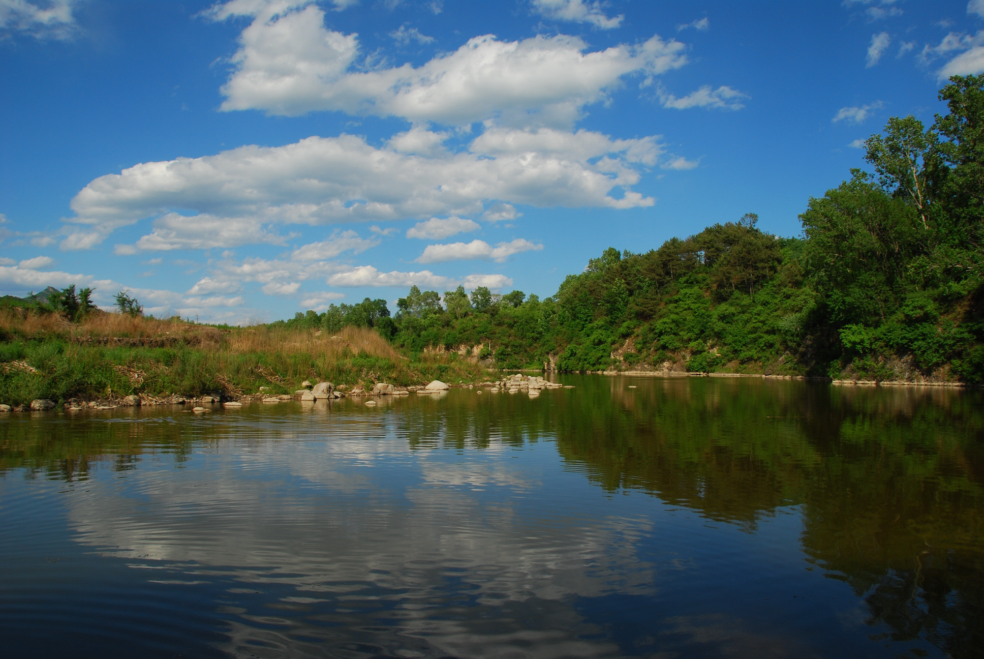 Yanqing, Beijing, China